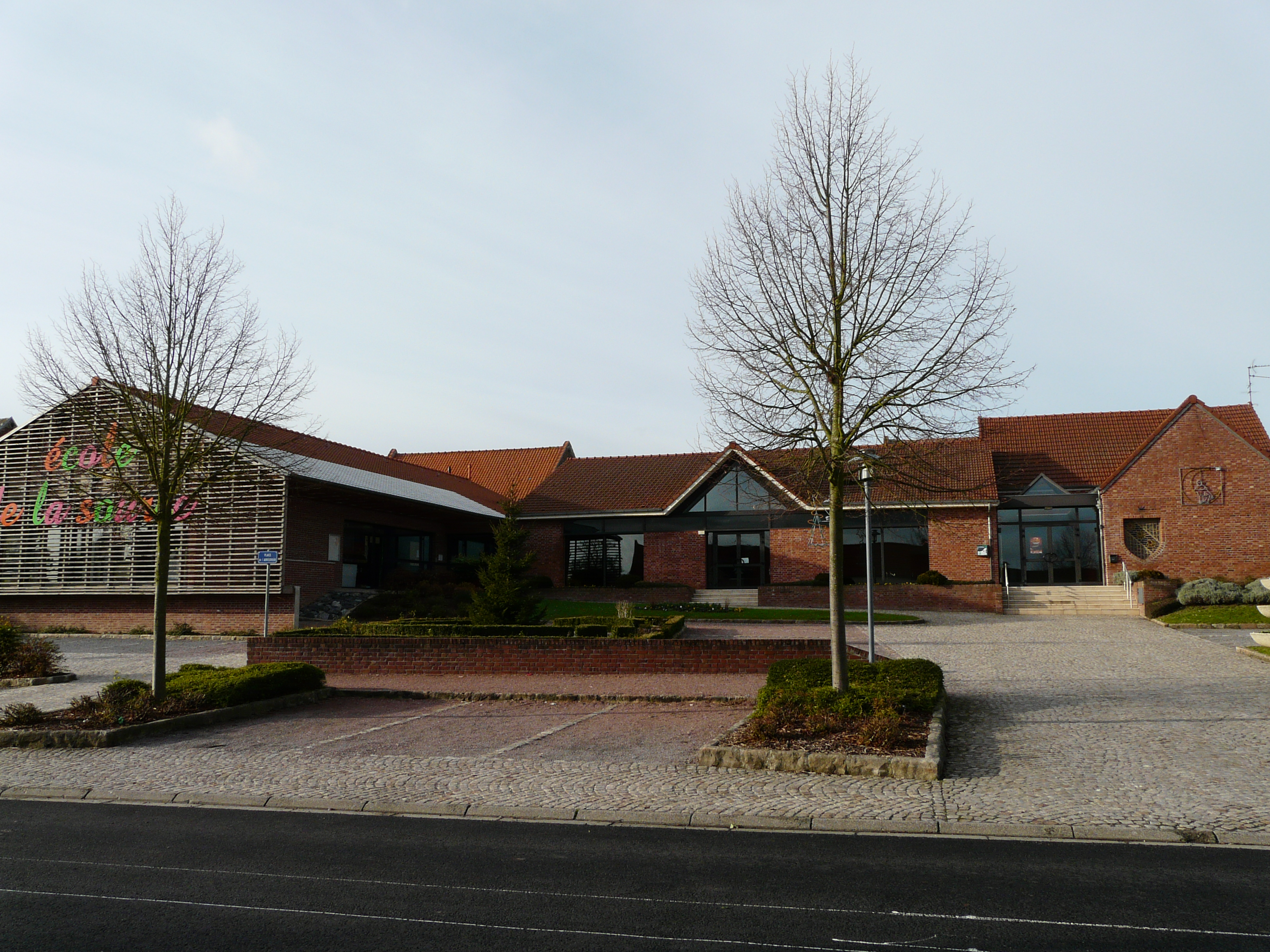 La mairie et l'école